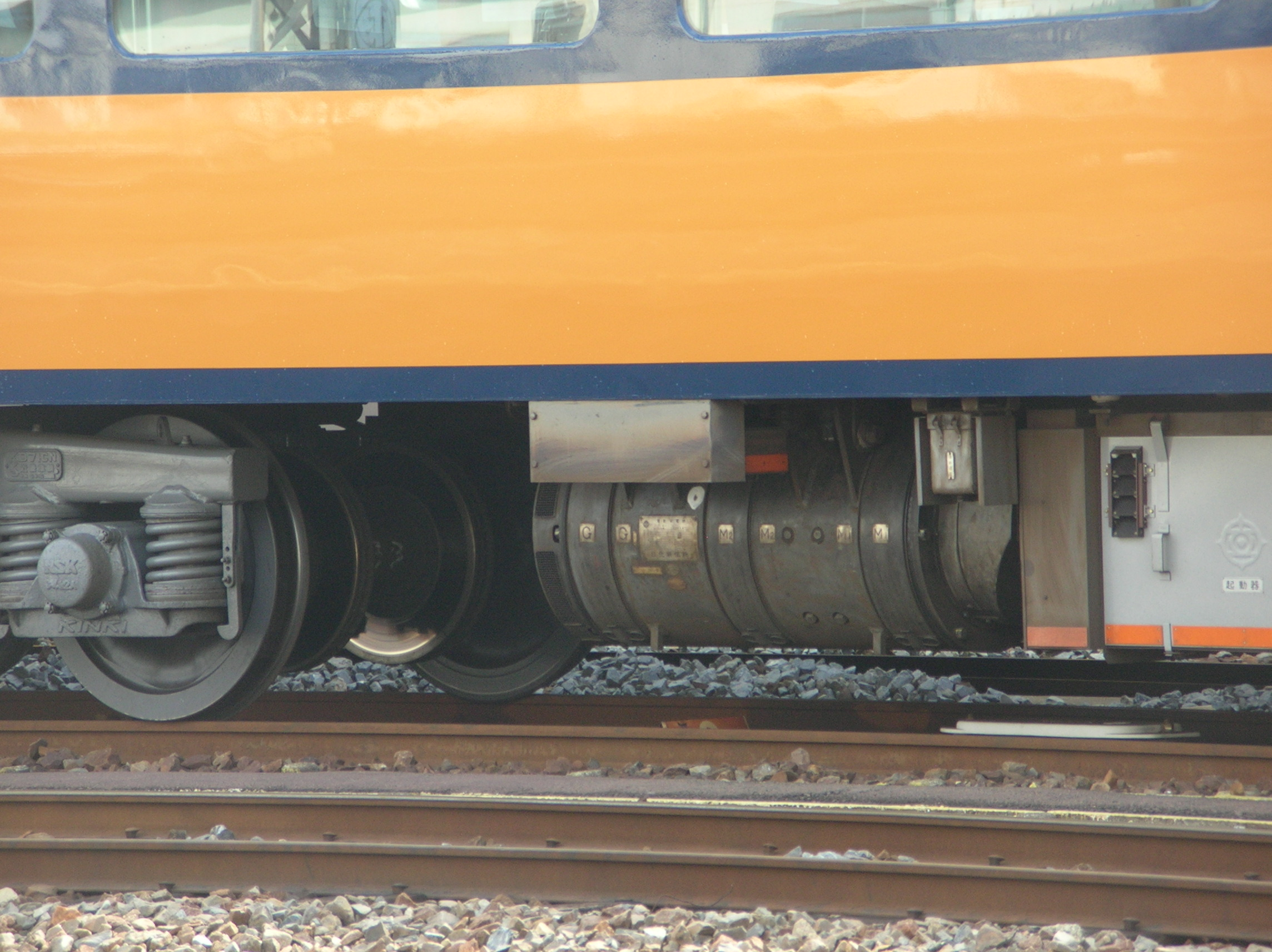 12200系の電動発電機